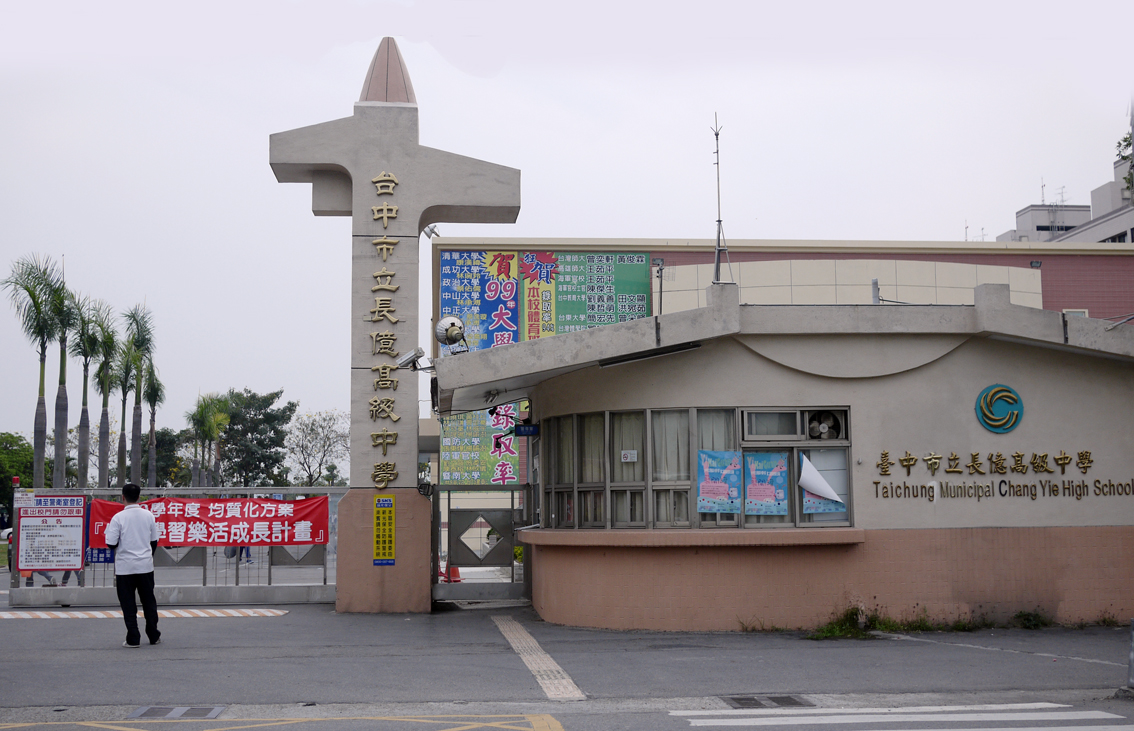 臺中市立長億高級中學大門。